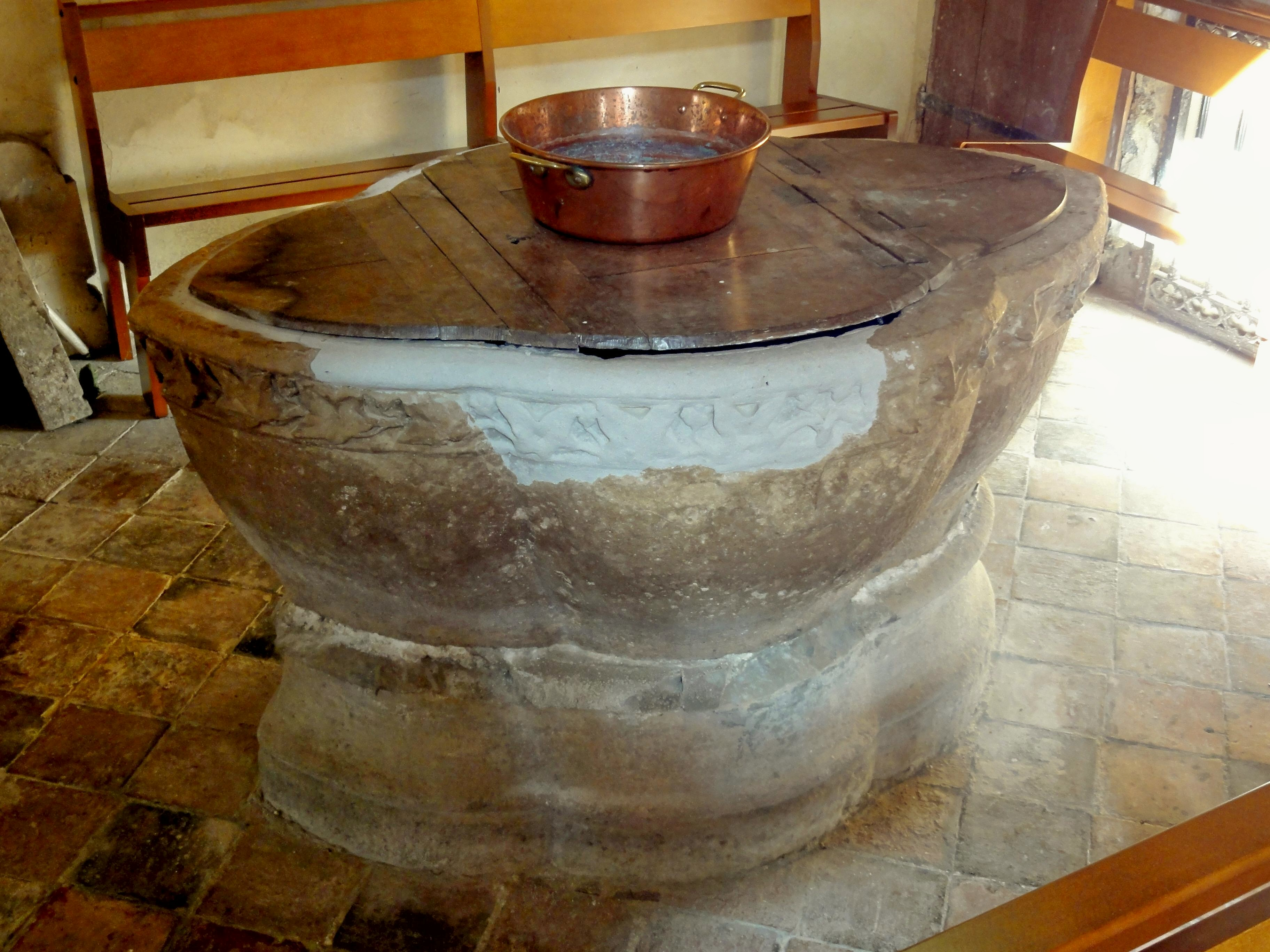 Première travée du bas-côté nord : fonts baptismaux.